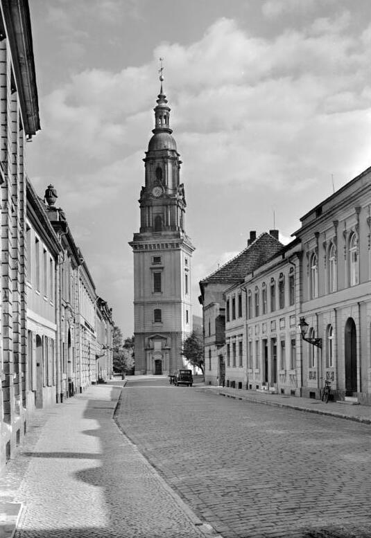 Potsdam.- Heiligengeistkirche (Heiliggeistkirche) von der Burgstraße